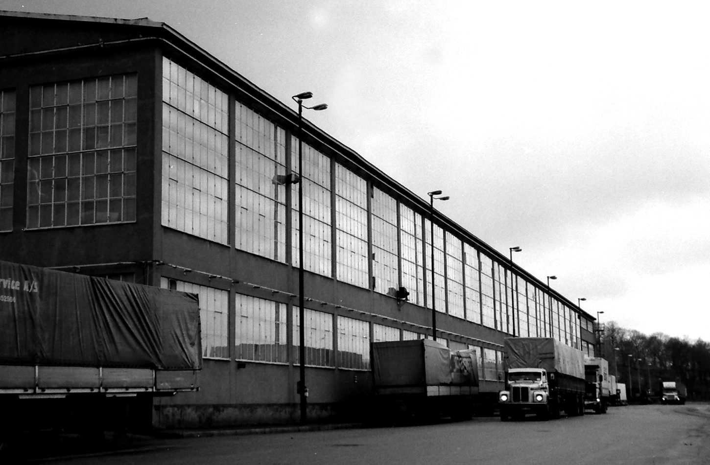 Uno Åhréns Ford Motor Comp. iStockholms frihamn